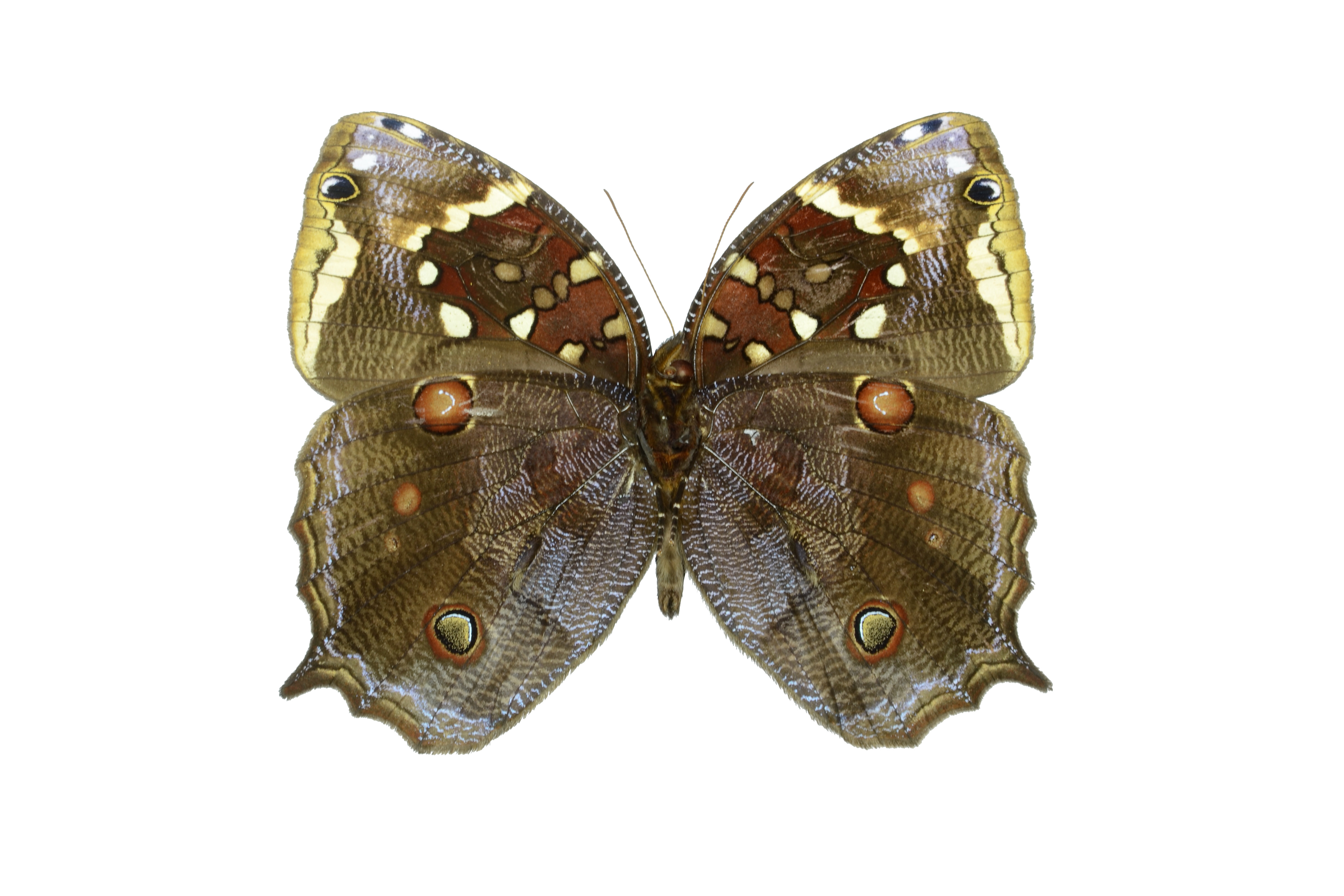 eastern Ecuador